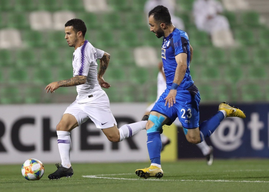 داریوش شجاعیان و سباستین جووینکو